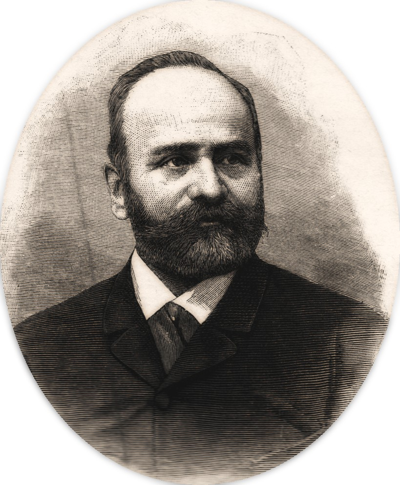 Professor Dr. Wilhelm Winternitz - Balneologe